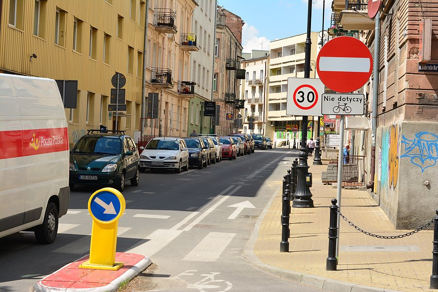 Kontrapas w Lublinie na Konopnickiej